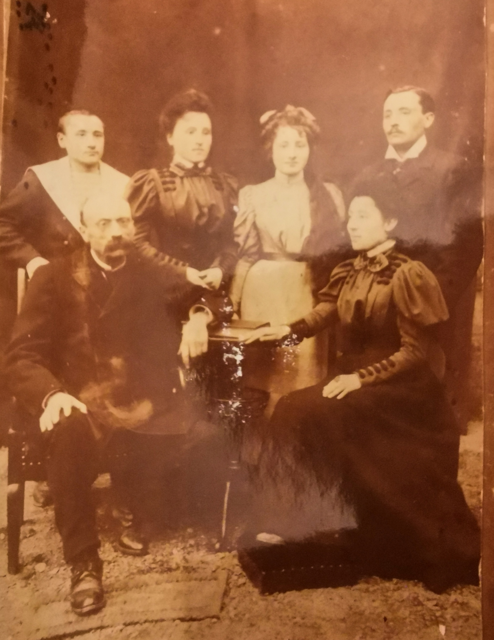 Alfred Sabail, assis à gauche, puis de gauche à droite, Emile Sabail, Aglaé Sabail, Henriette Sabail, Louis Sabail et assise Marie Sabail.